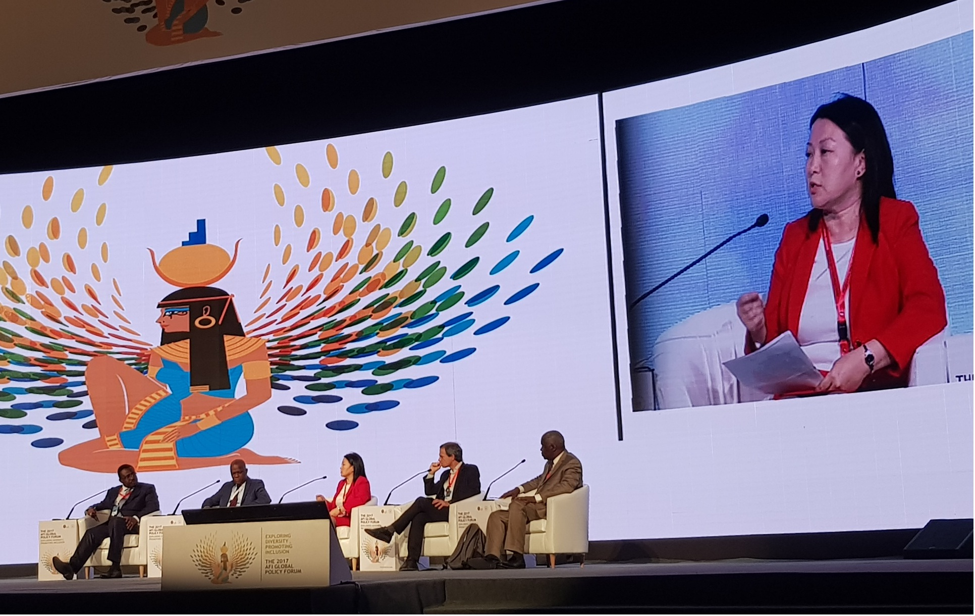 Монгол: Санхүүгийн зохицуулах хорооны дарга С.Даваасүрэн Олон улсын санхүүгийн хүртээмжийн нийгэмлэгийн Захирлуудын зөвлөлд сонгогдов. 2017 он.